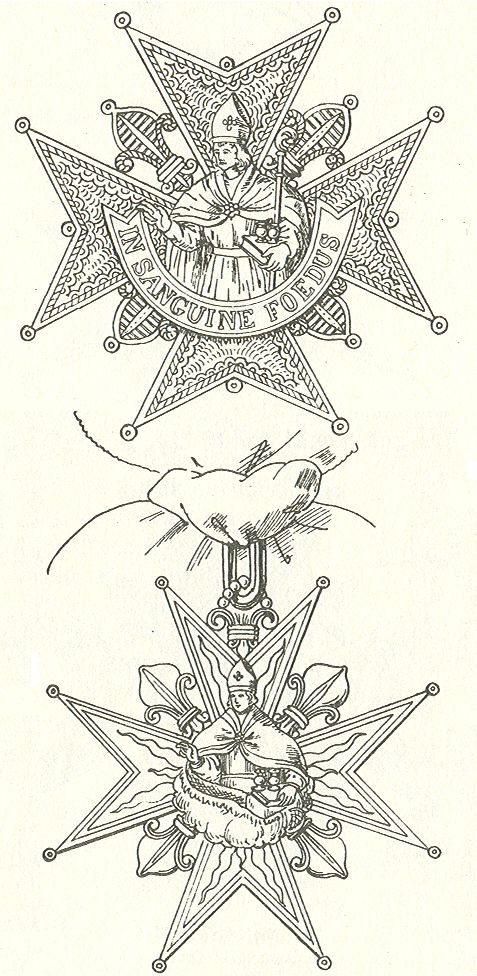 Orde van Sint-Ferdinand en de Verdienste Napels 1800 Ridder/knight